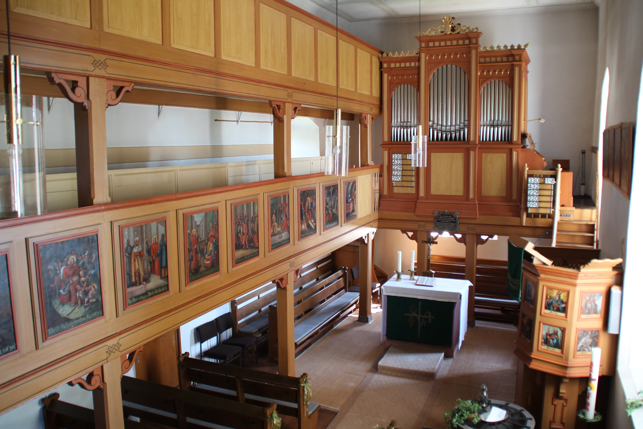 Orgel der Evangelischen Kirche Burkhardsfelden, Gemeinde Reiskirchen, Landkreis Gießen, Hessen, Deutschland